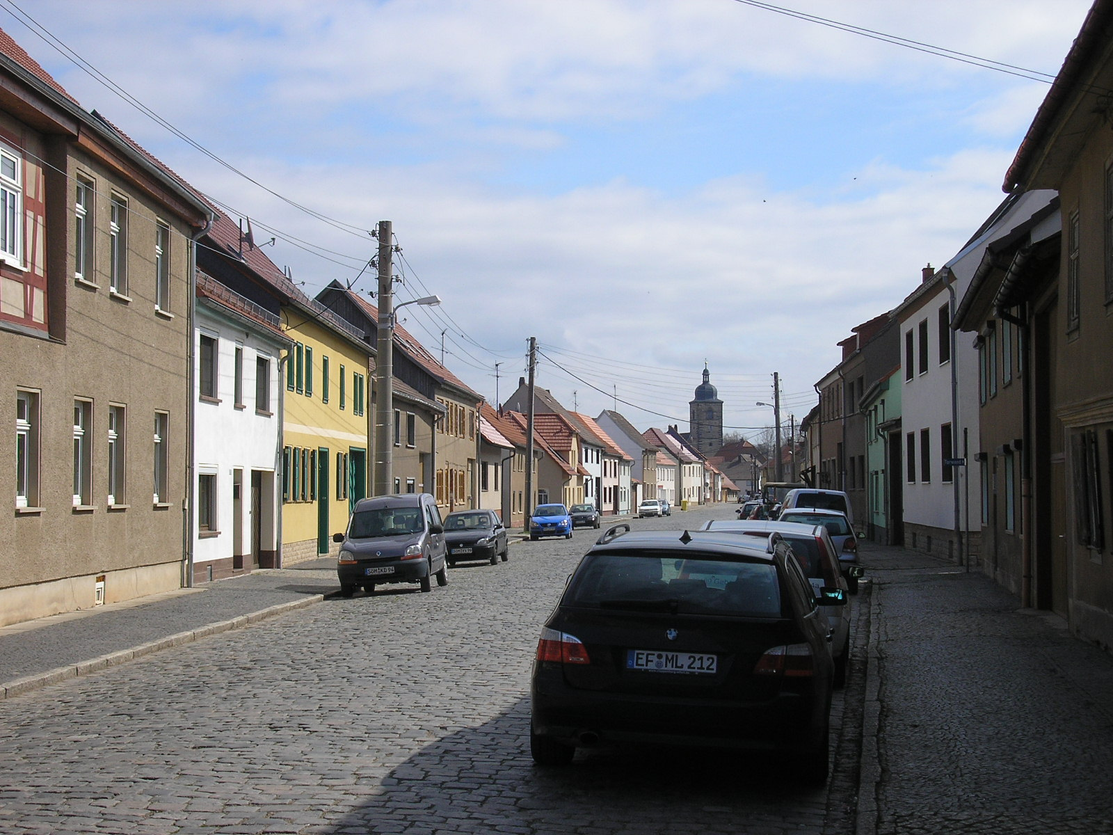 Blick durch eine der Straßen in der Altstadt von Gebesee (Thüringen).